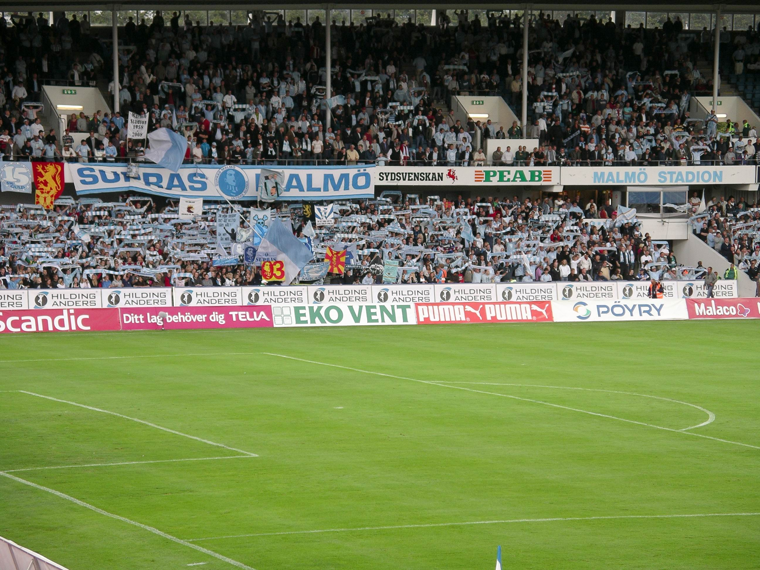 Malmö FF-Hammarby IF (2-4), Fotollsallsvenskan